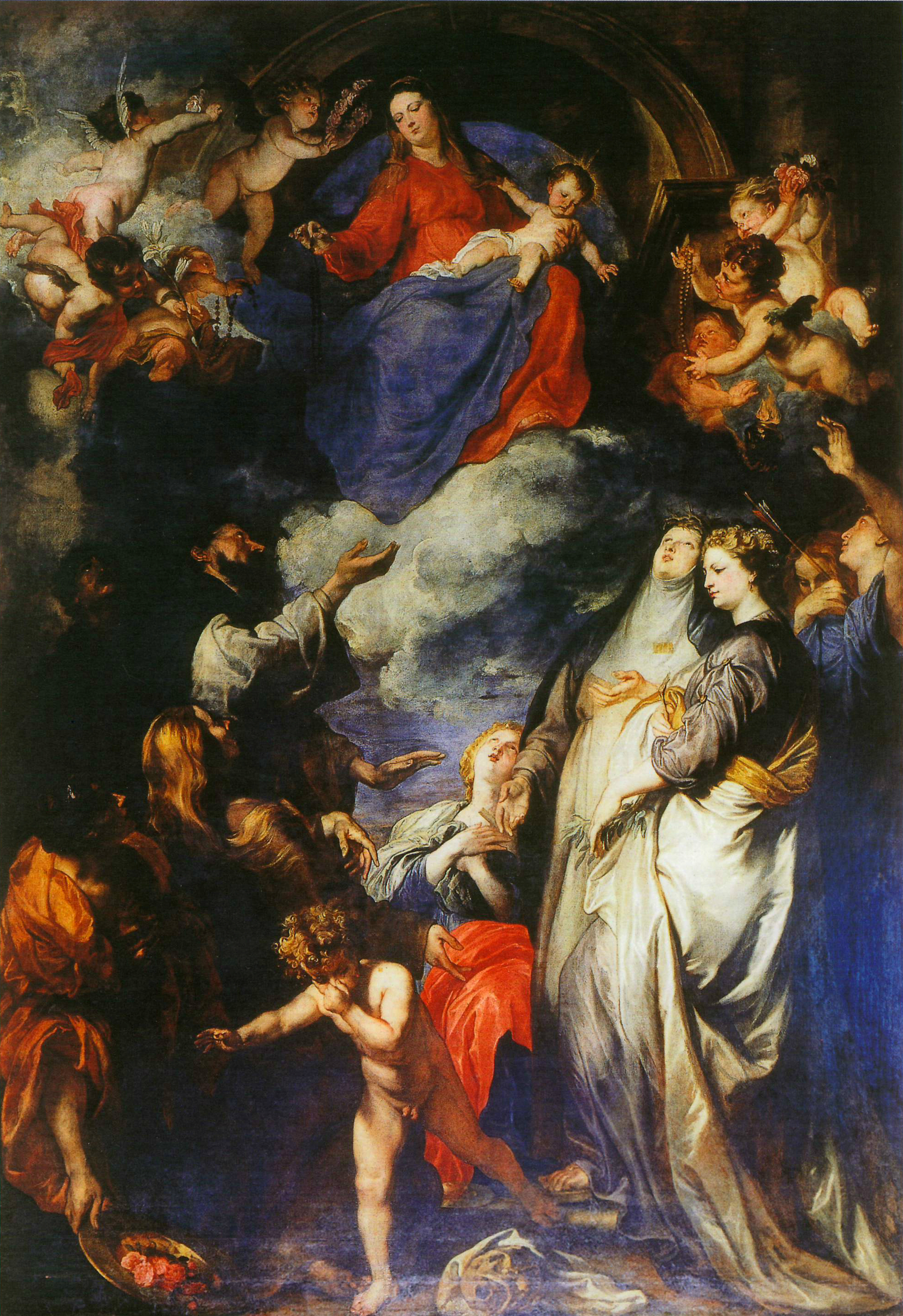 Madonna del Rosario Madonna of the Rosary.label QS:Lit,"Madonna del Rosario con San Domenico e Santa Caterina da Siena, e i santi Vincenzo Ferreri, Oliva, Ninfa, Agata, Cristina e Rosalia: olio su tela di Antoon van Dyck. Palermo, Oratorio del Rosario di San Domenico." label QS:Len,"Madonna of the Rosary."